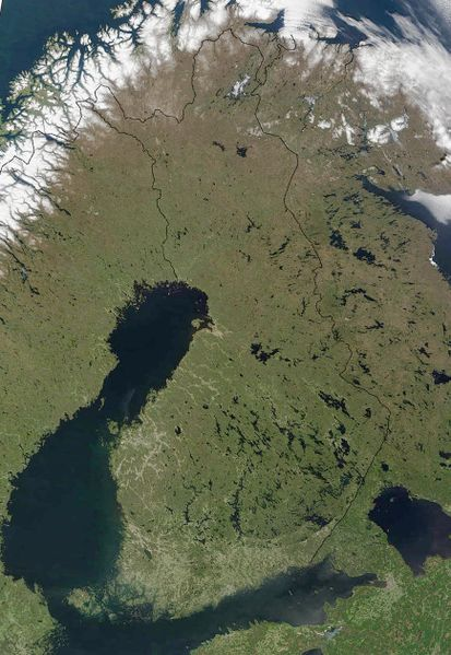 Finland, NASA Satellite image